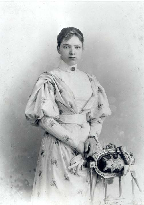 Willemine Elisabeth Edzardine de Ranitz (1875-1960)